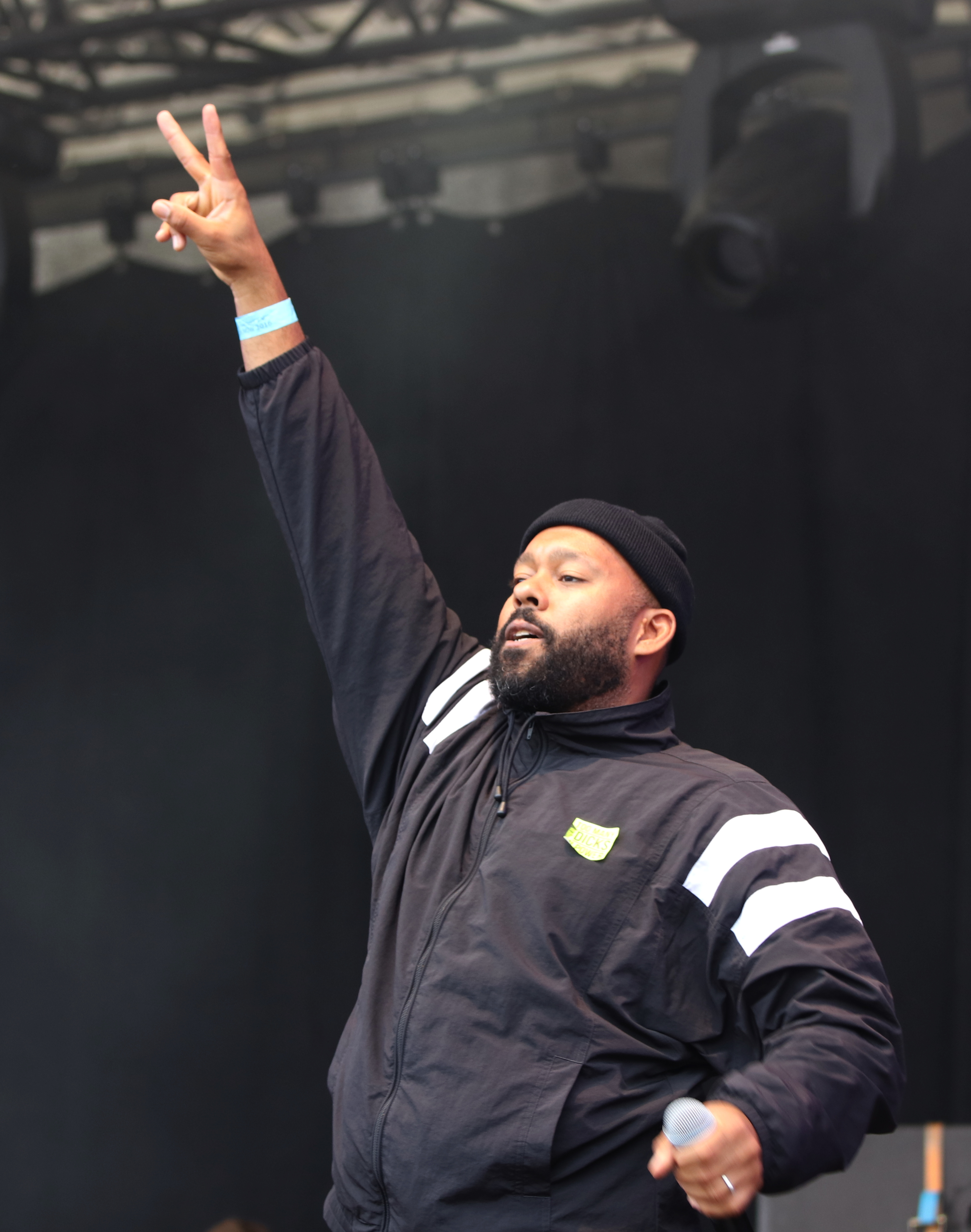 Ausgehetzt, Demonstration in München am 22. Juli 2018 gegen den Rechtsruck in der bayerischen Politik